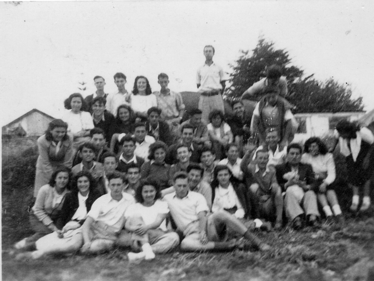 חטיבת הנגב הגדוד השני הכשרת מכבי הצעיר גרעין ה - המכבי הצעיר גרעין ה-התגבשות והכשרה - חלק מחברי ההכשרה עם חברים מ-"הסוללים"